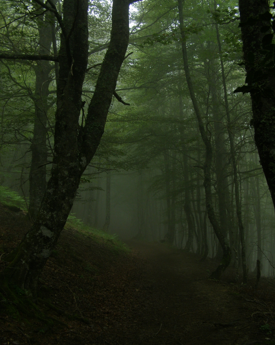 Un bosque de cuento de hadas: el hayedo en el Monte Saperu (Parque Natural de Redes, Asturias) bajo la niebla.